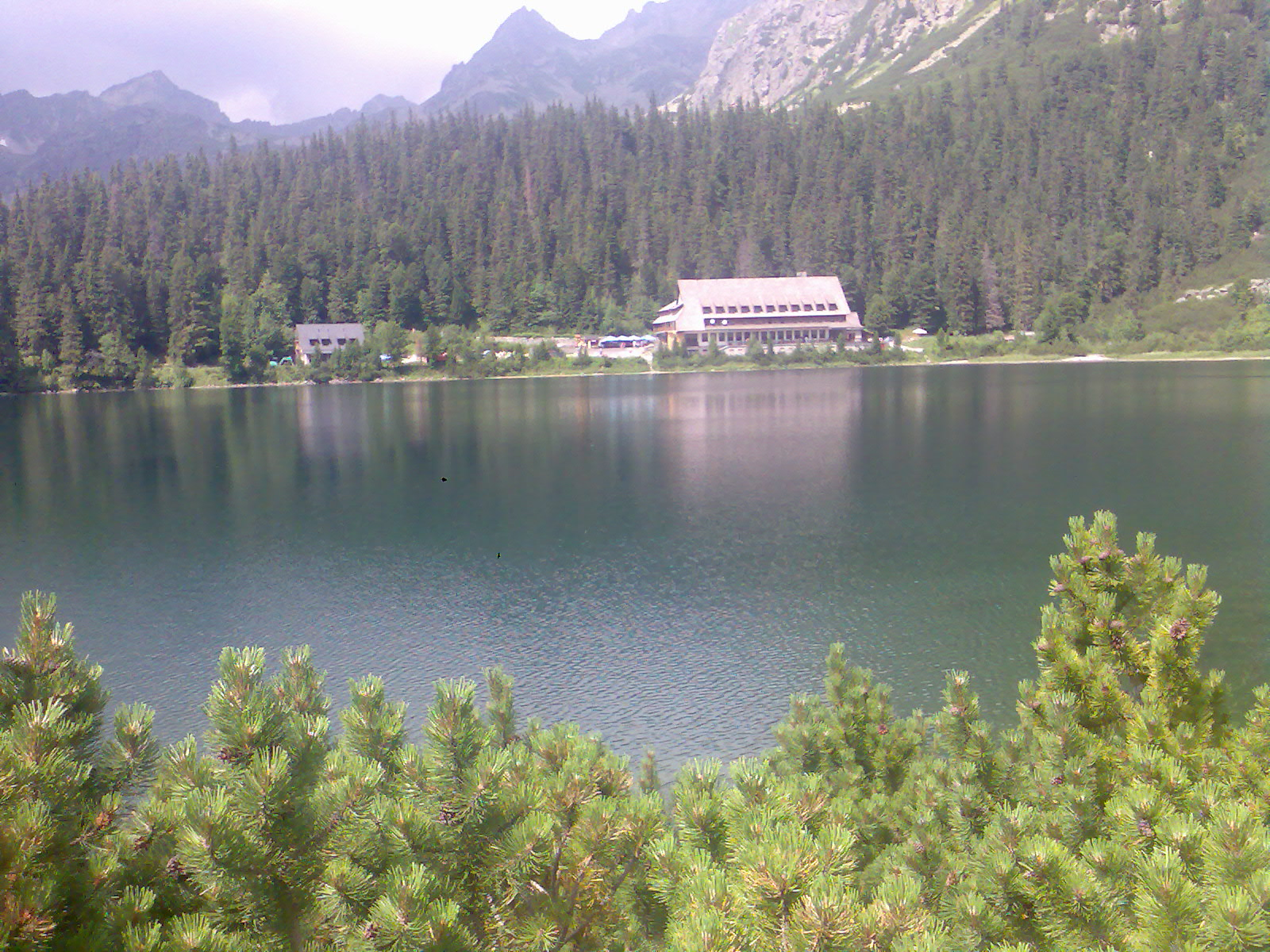 Pleso a chata